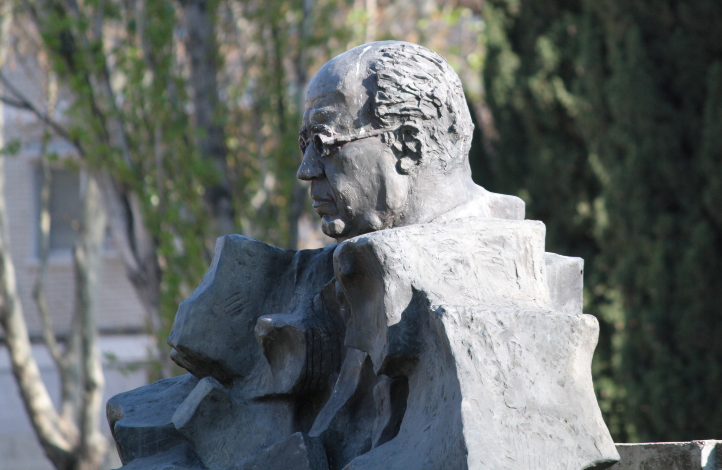 Manuel Azaña. Alcalá de Henares, Comunidad de Madrid, España